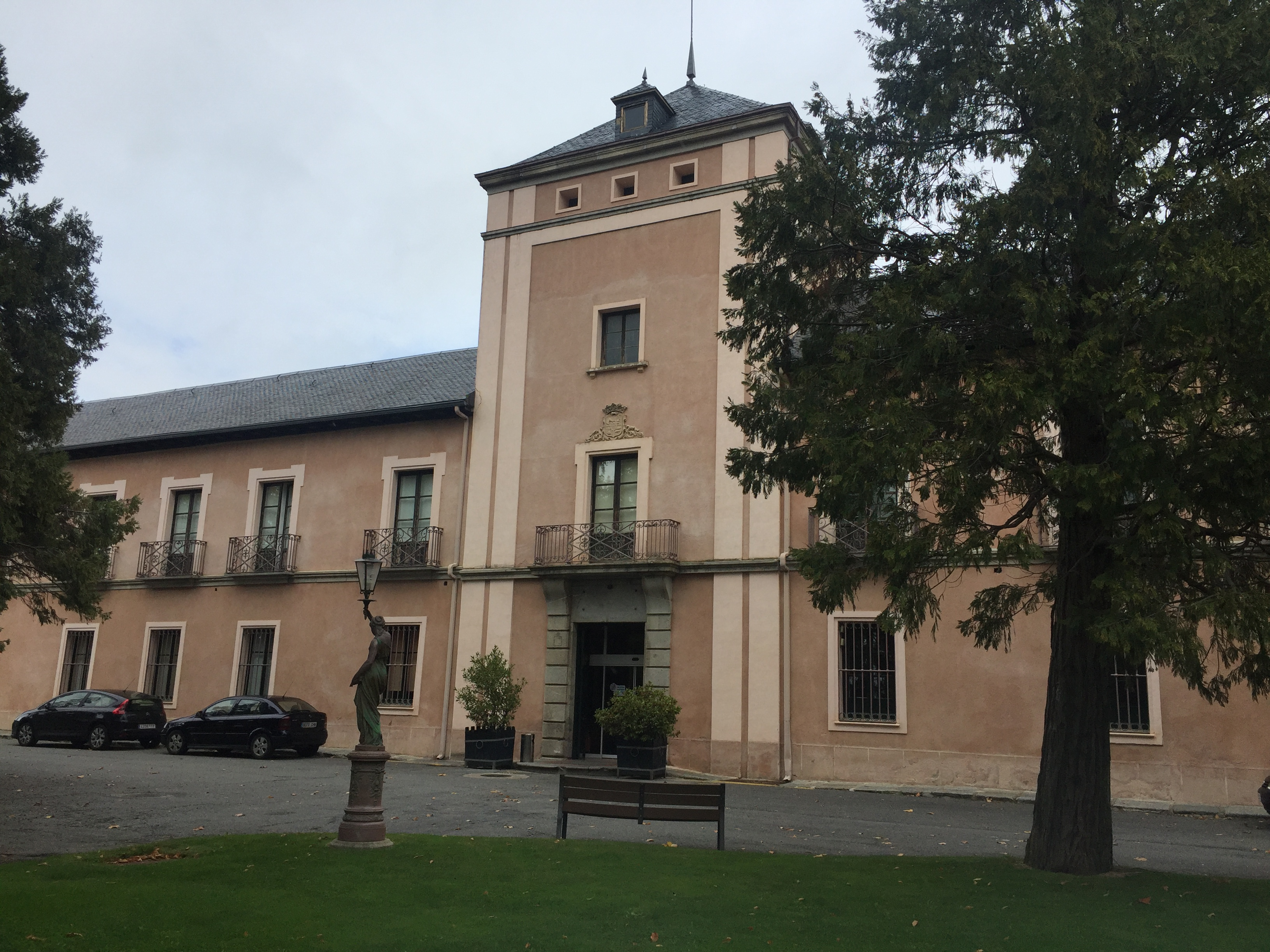 Fachada principal casa palacio de la Real Quinta de Quitapesares desde el sur